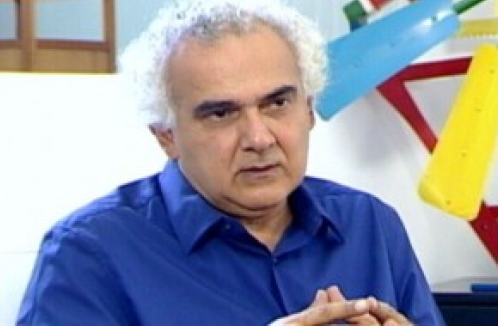 Milton Assi Hatoum (Manaus, 19 de agosto de 1952) é um escritor, tradutor e professor brasileiro. Hatoum é considerado um dos grandes escritores vivos do Brasil.